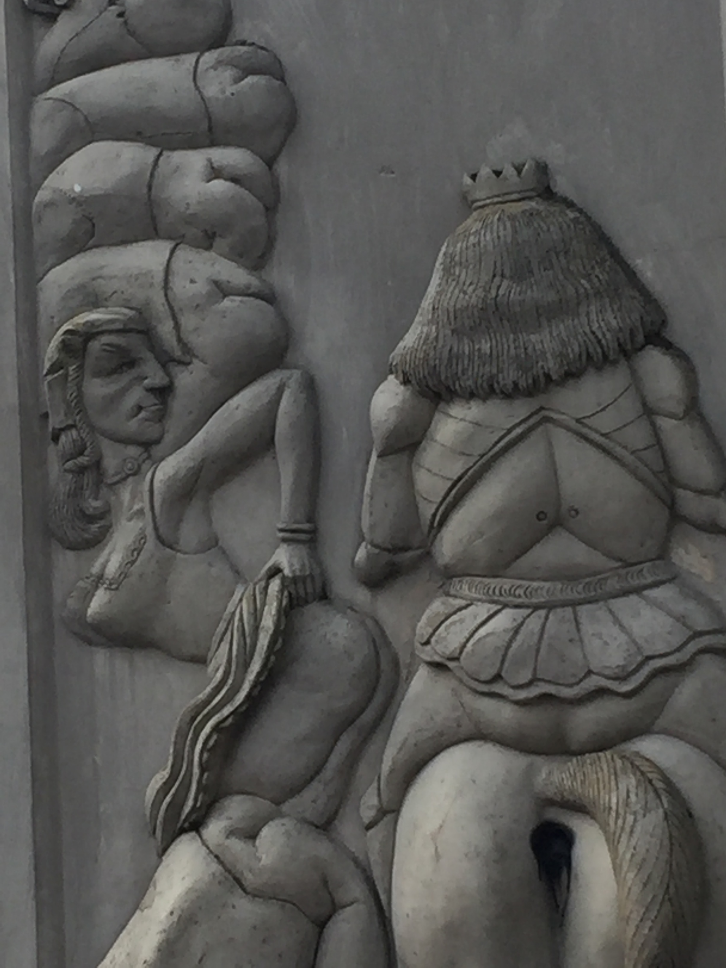 Die Bardowicker Gesäßhuldigung auf dem Löwendenkmal - Detailansicht